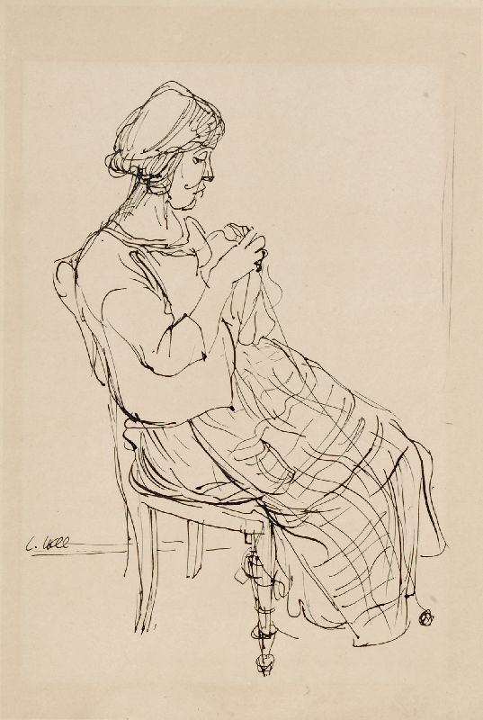 Portrait Erna Krake (die Frau des Künstlers), Federzeichnung in Tusche.